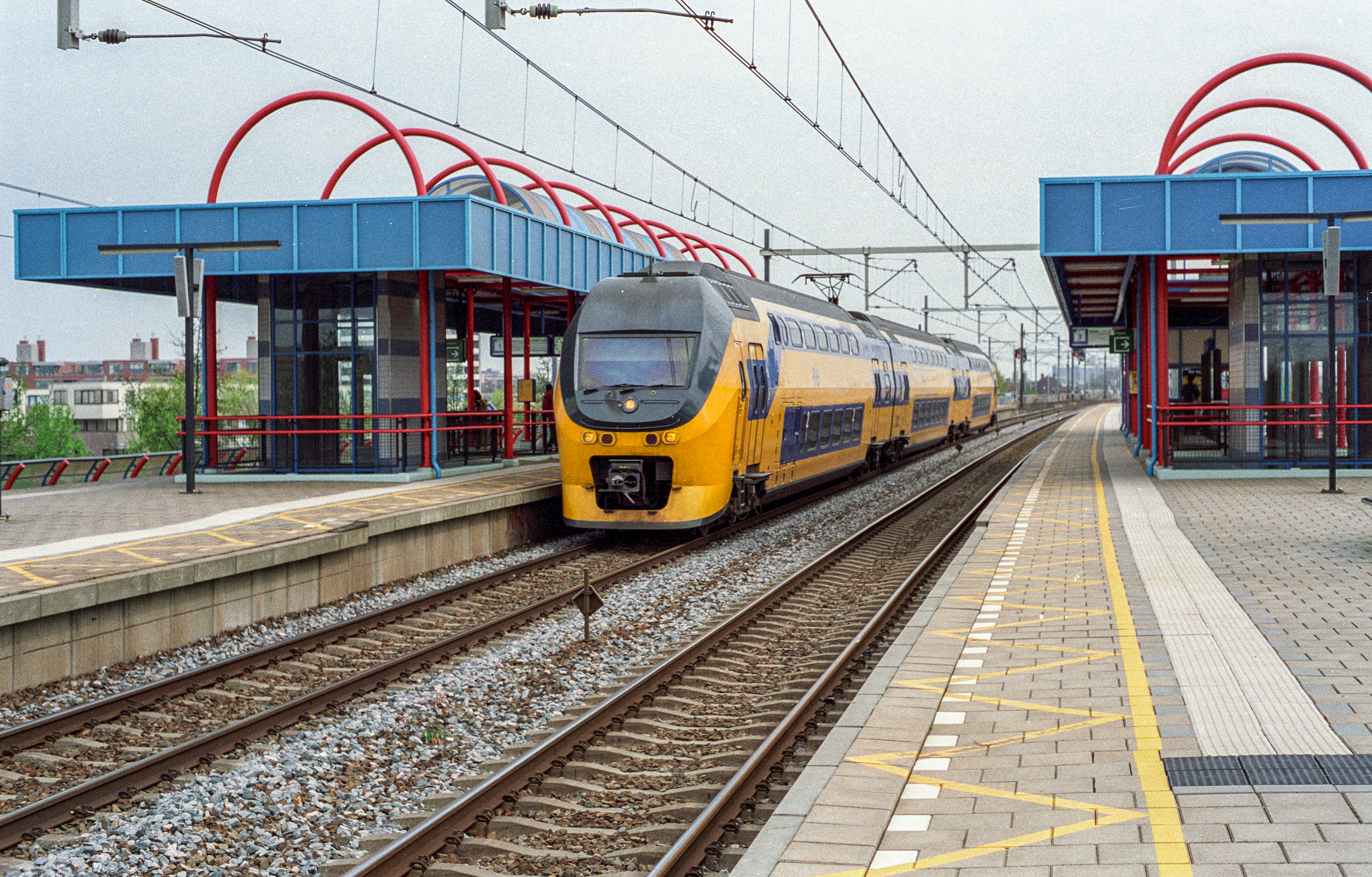 8280 IC 2441 Amsterdam Centraal - Dordrecht De Vink 02-05-2001 T200105-0004